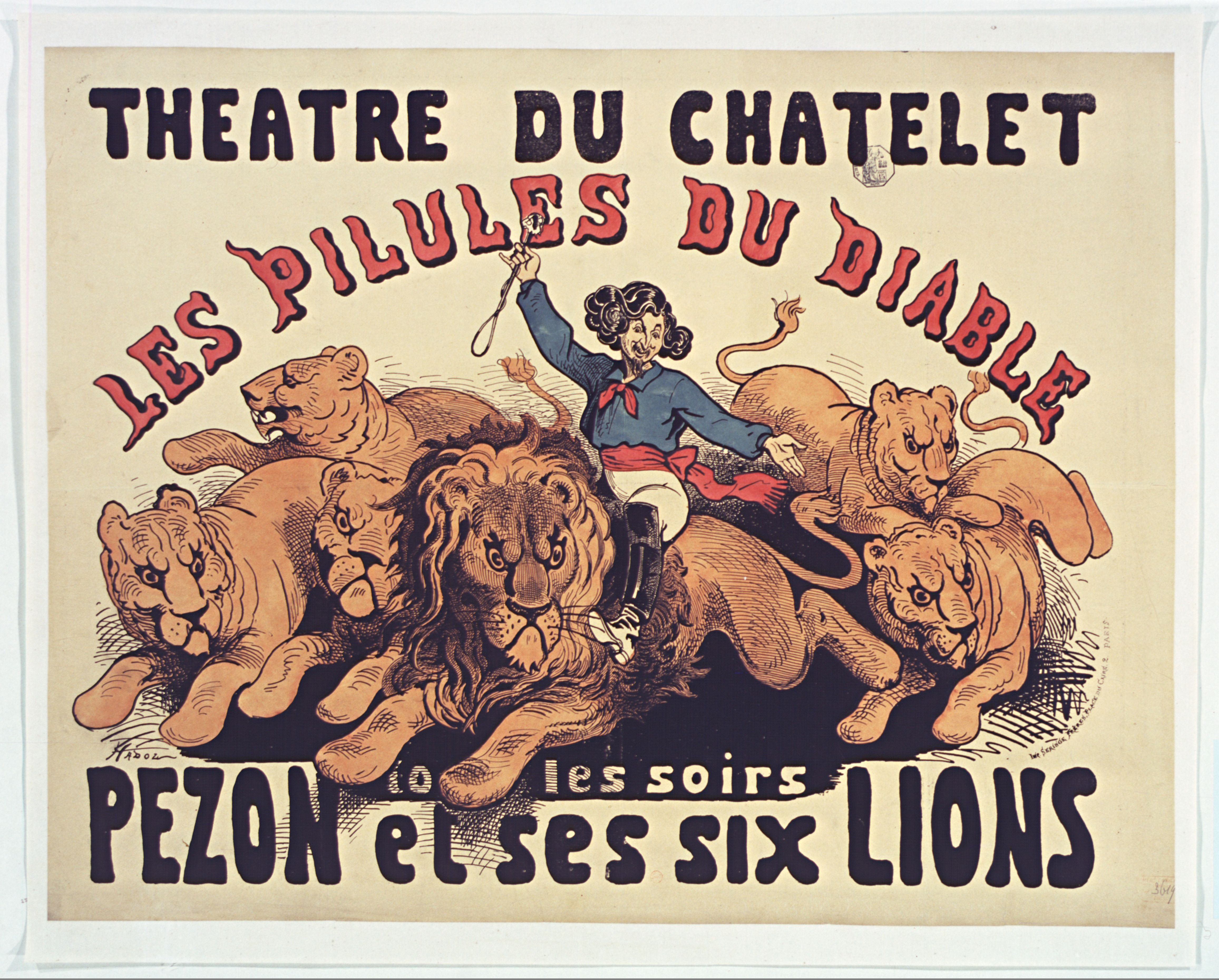 Affiche : Théâtre du Chatelet. Les Pilules du diable. Tous les soirs Pezon et ses six lions